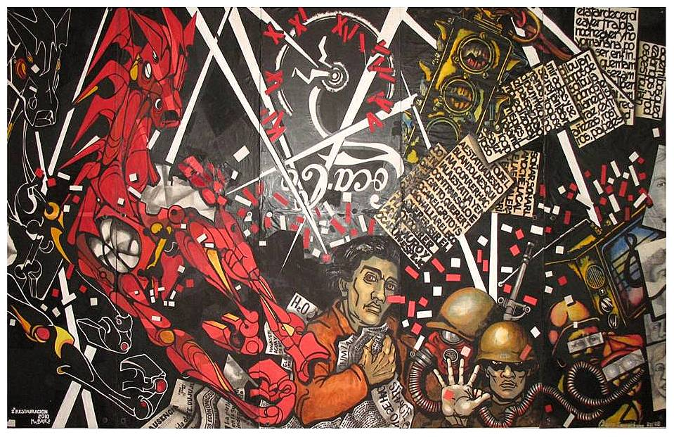 3ª BIENAL INTERNACIONAL DE ARTE BOLIVIA, ¨PUKARA¨ Mención a la Pintura Mural, Museo Nacional de Arte. La Paz - Bolivia. Pintura de gran formato realizada en técnicas mixtas en papel imprimado sobre madera, la obra representa el ambiente de violencia estatal de un periodo histórico de la década de los 80, en la que el autor expresa una situación de peligro, transformándola en un hecho surrealista. La obra se expuso durante una década en el Conservatorio Nacional de Música, fue agredida y semi destruida por vandalismo y luego abandonada. El año 2010 se restauró para su ubicación definitiva en la Escuela de Músicas Contemporáneas en La Paz, donde se encuentra en la actualidad.